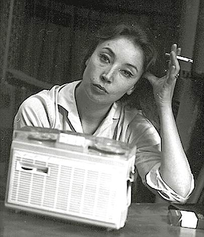 Oriana Fallaci en los años cincuenta